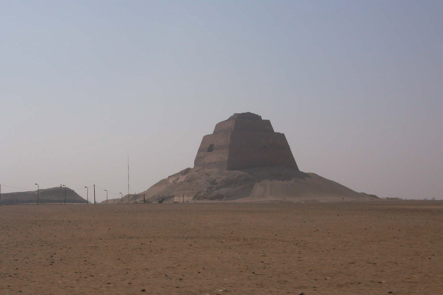 Pyramide von Meidum, links die ebenfalls sehens- und begehngswürdige Mastaba. Fotografiert am 09.06.2002 Das Fotos wurde von mir selbst erstellt und ist im Originalzustand (also nicht bearbeitet) Weitere Fotos unter